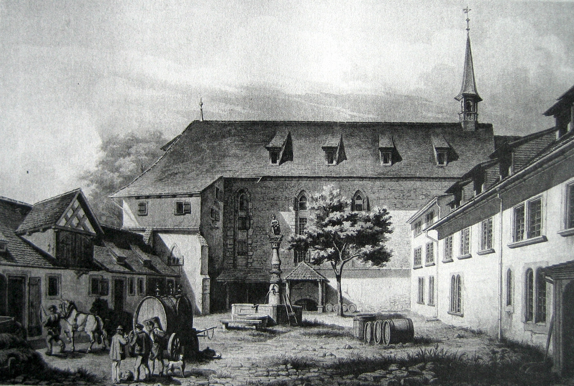 Kloster Oetenbach 1871 von Nordwesten, getönte Federzeichnung von J.C. Werdmüller (1819-1892), Depot des Stadtrates von Zürich